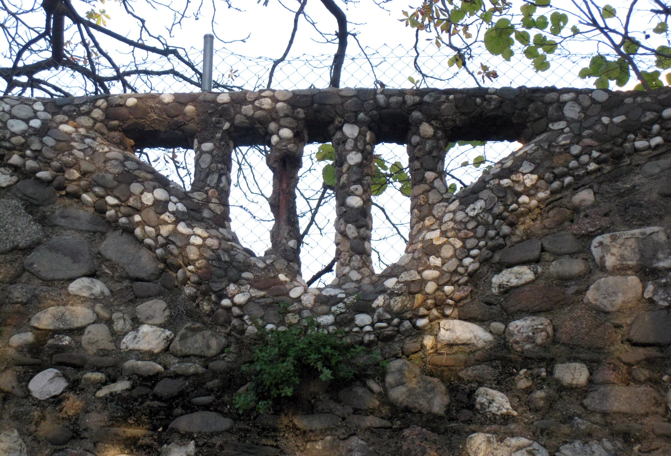 Murs de contenció de la Casa Salvans (Terrassa) Object location41° 33′ 56.22″ N, 2° 01′ 10.38″ E